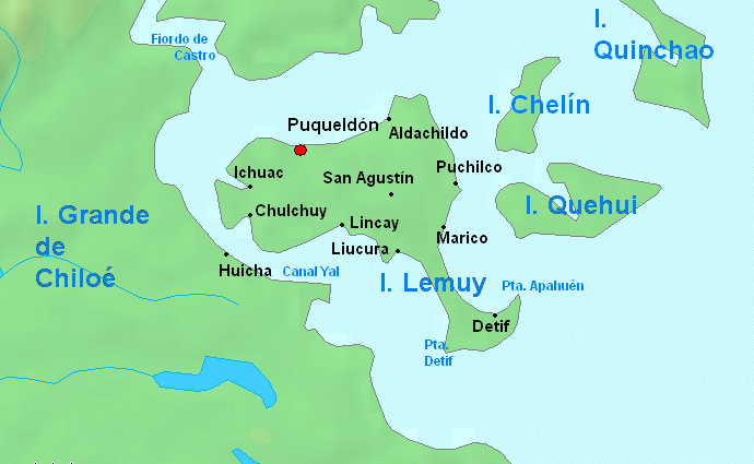 Mapa de la Isla Lemuy en Chiloé, con accidentes geográficos y sectores